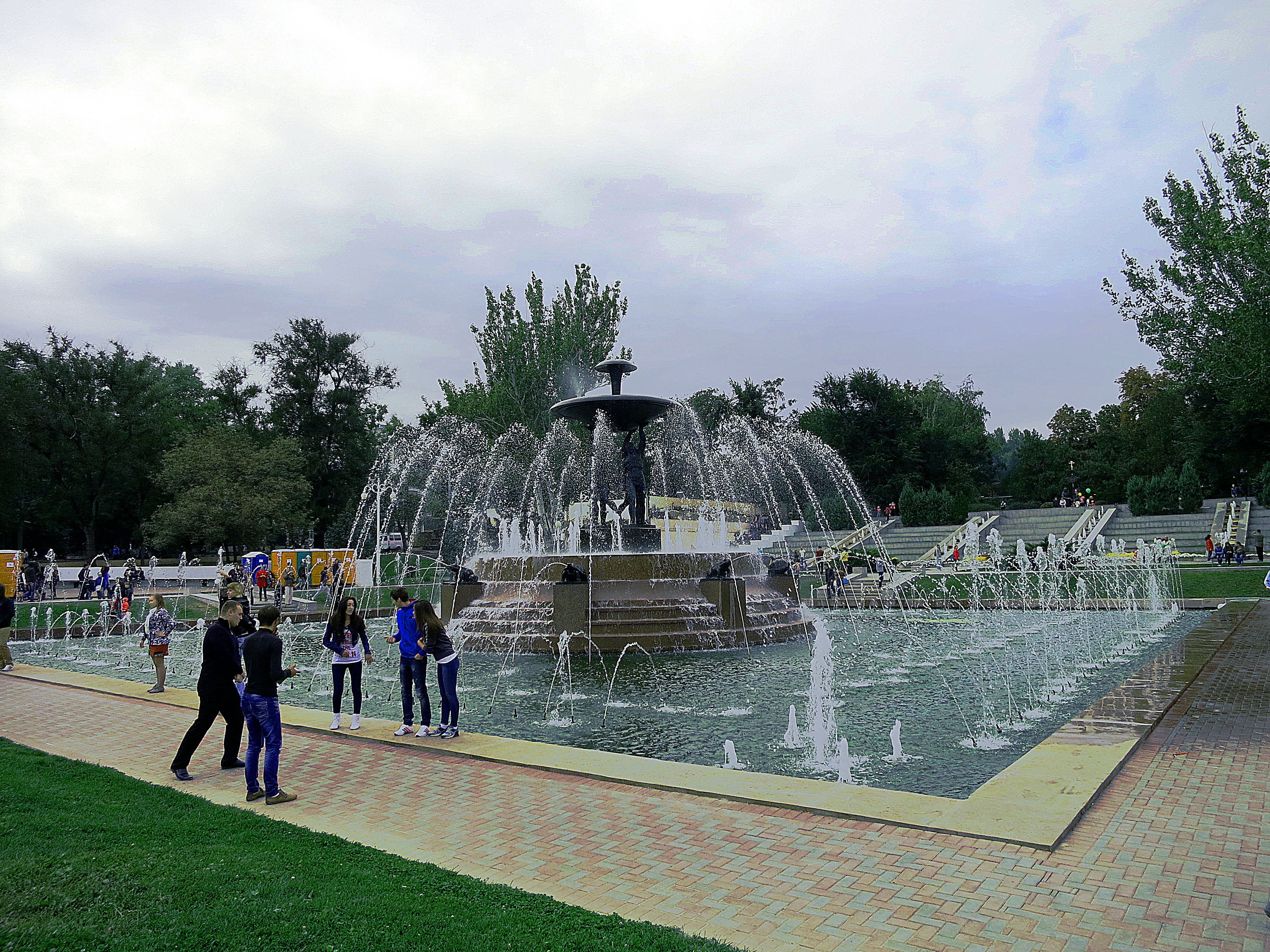 Фонтан и каскады в западном партере Театральной площади (Ростовская область, Ростов-на-Дону, Театральная площадь, 1)